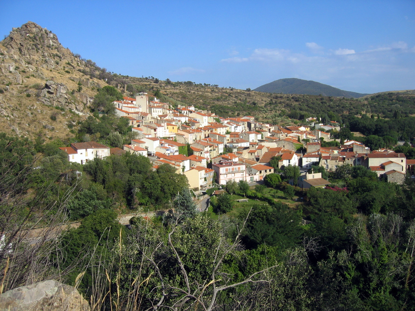 vue générale du village français de Rodès dans les Pyrénées Orientales